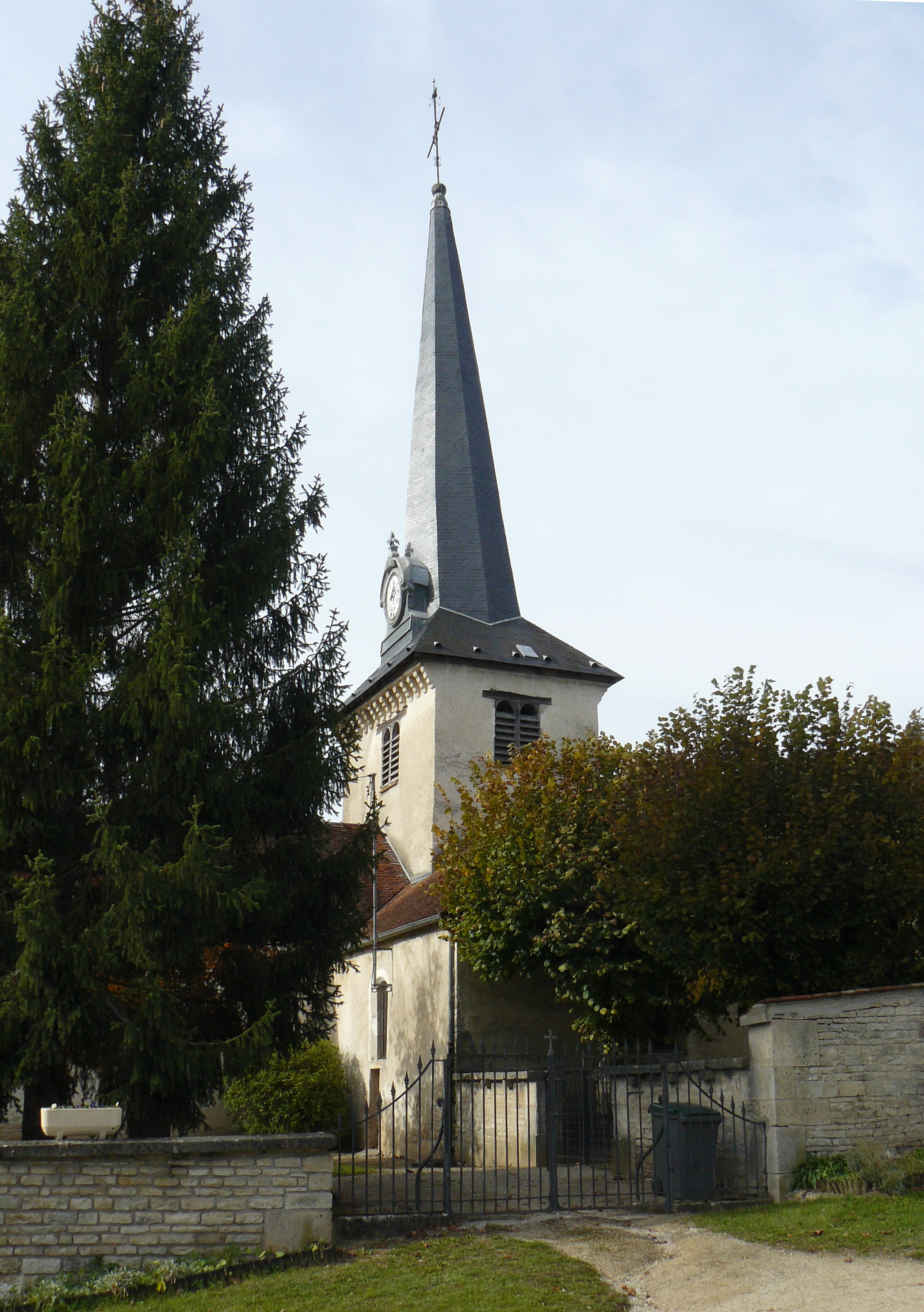 Verpillières-sur-Ource (Aube, France), l'église du village.